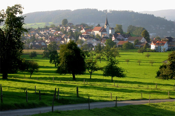 Bichwil; September 2004; GNU-FDL; selbst fotografiert